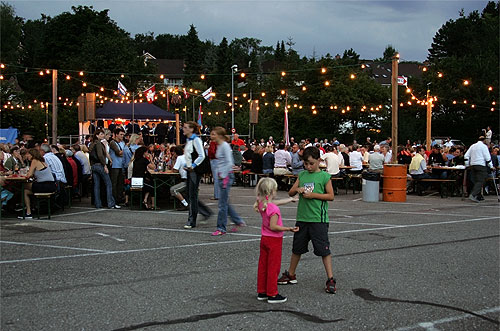 1. August-Feier in Reinach: Festgemeinde